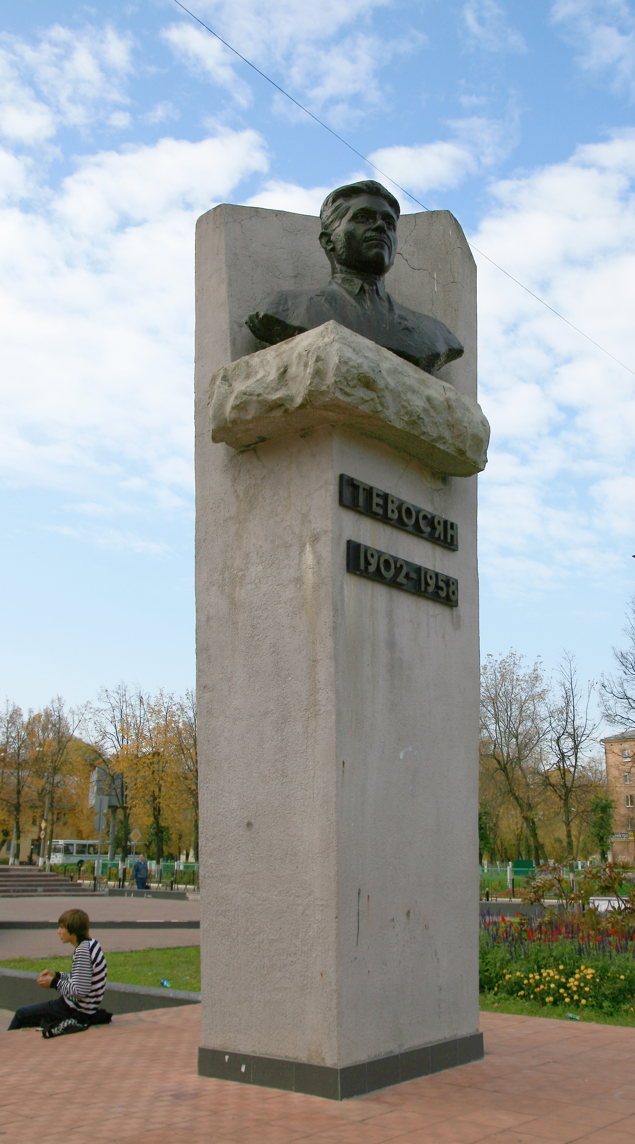 памятник Тевосяну в городе Электросталь.Московская область.